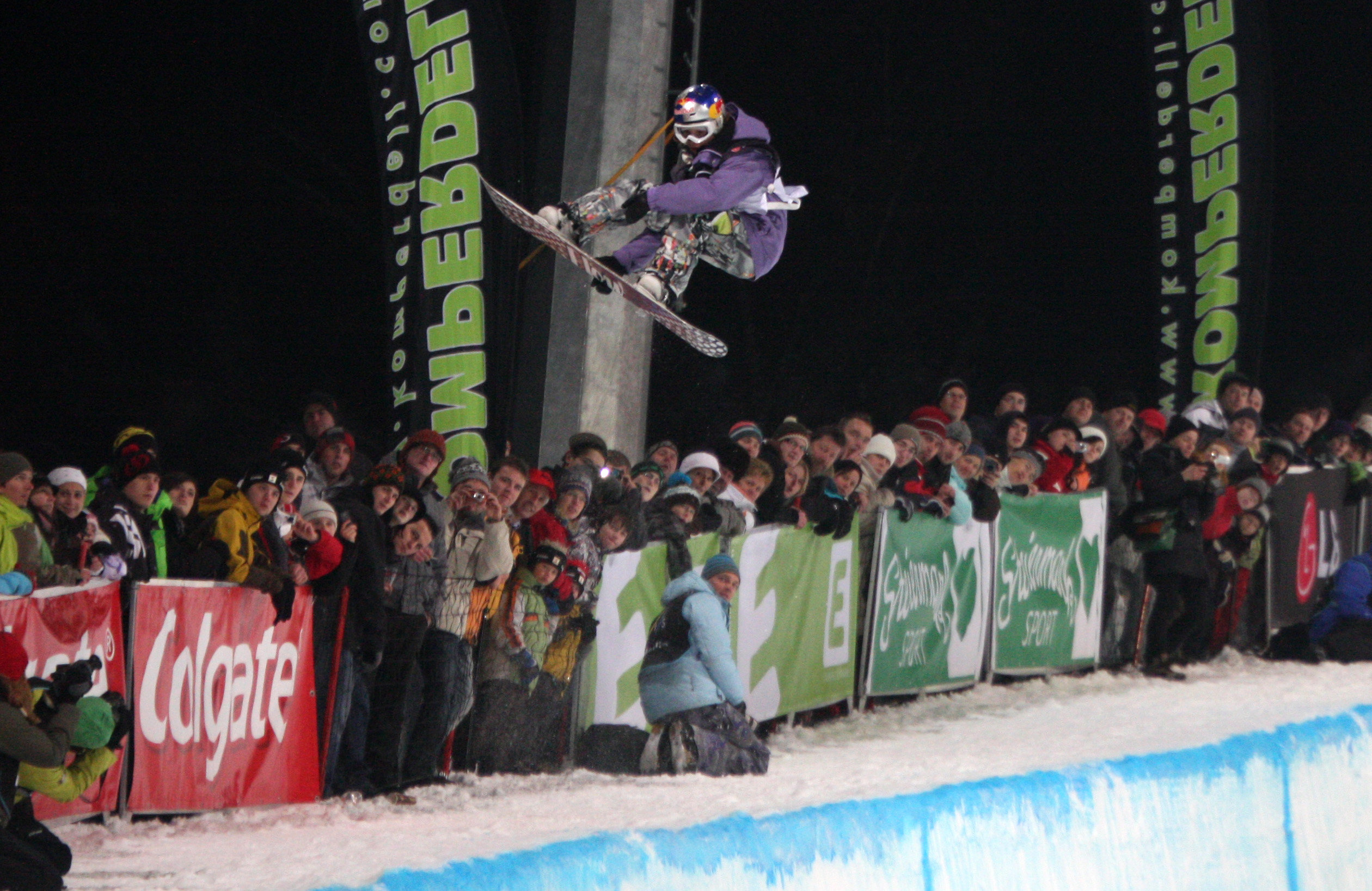 Kreischberg_HP_Sarka_Pancochova_CZE